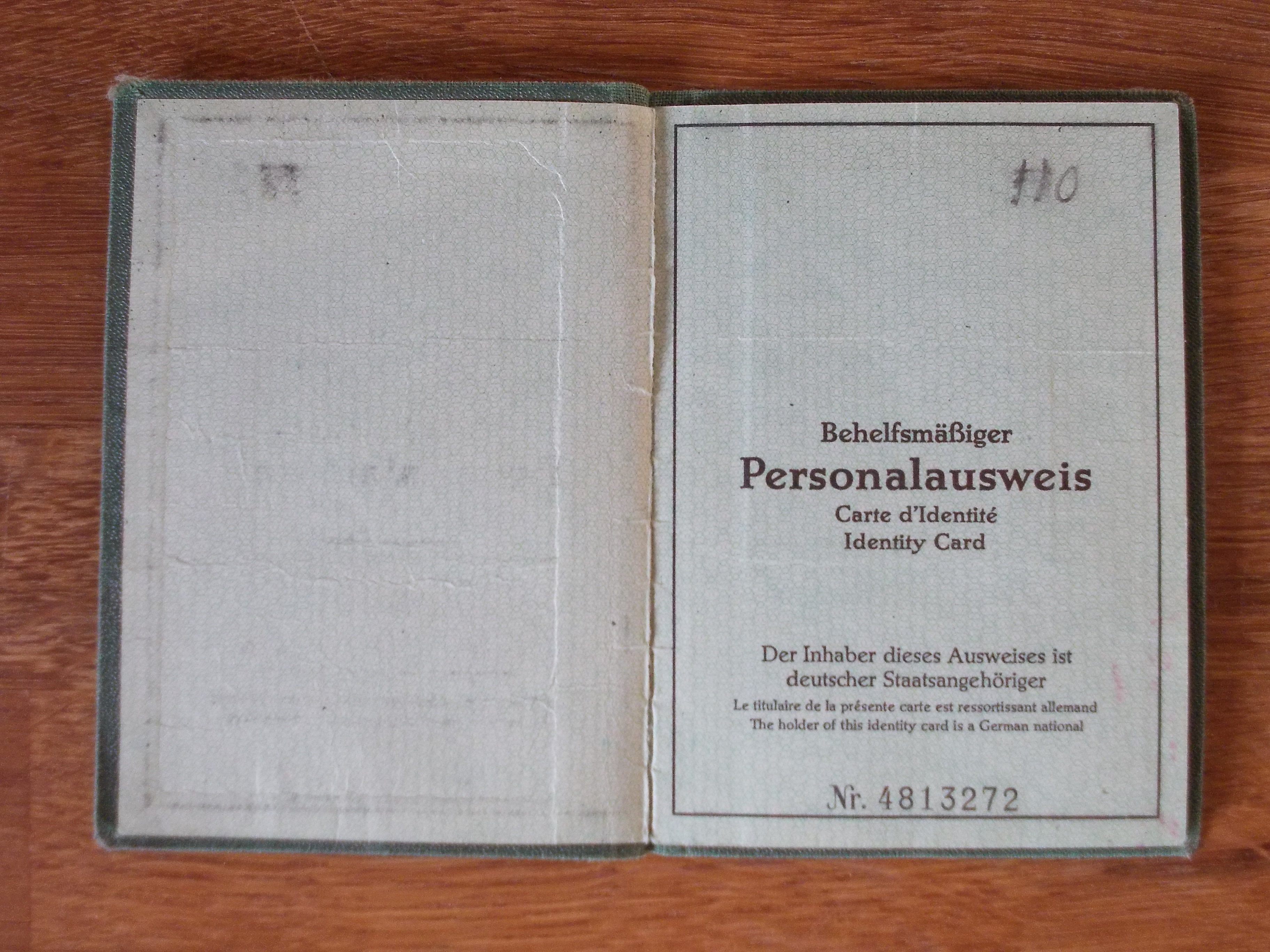 Behelfsmäßiger Personalausweis (West-Berliner Personalausweis)